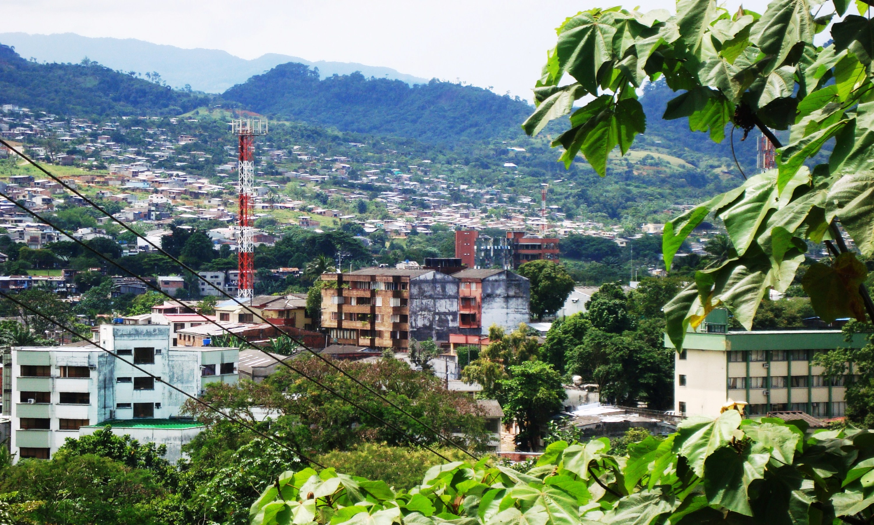 Panorámica parcial del centro-sur de Florencia, Caquetá, Colombia